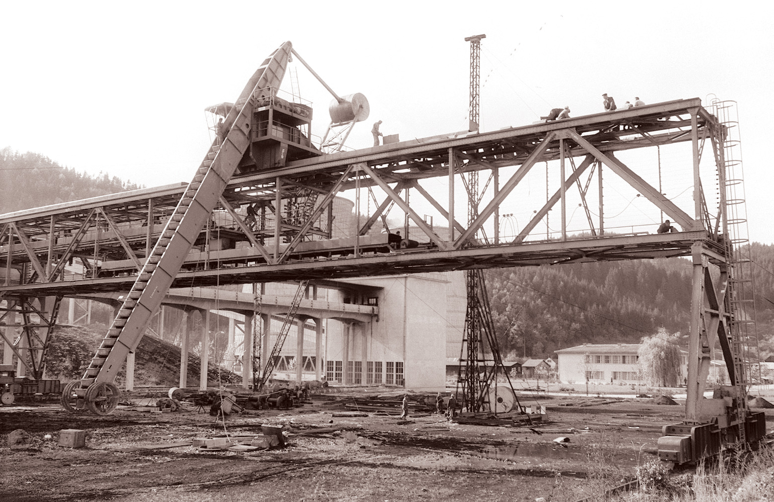 Mariborska Metalna postavlja 200-tonski prekladalni most v šoštanjski termoelektrarni